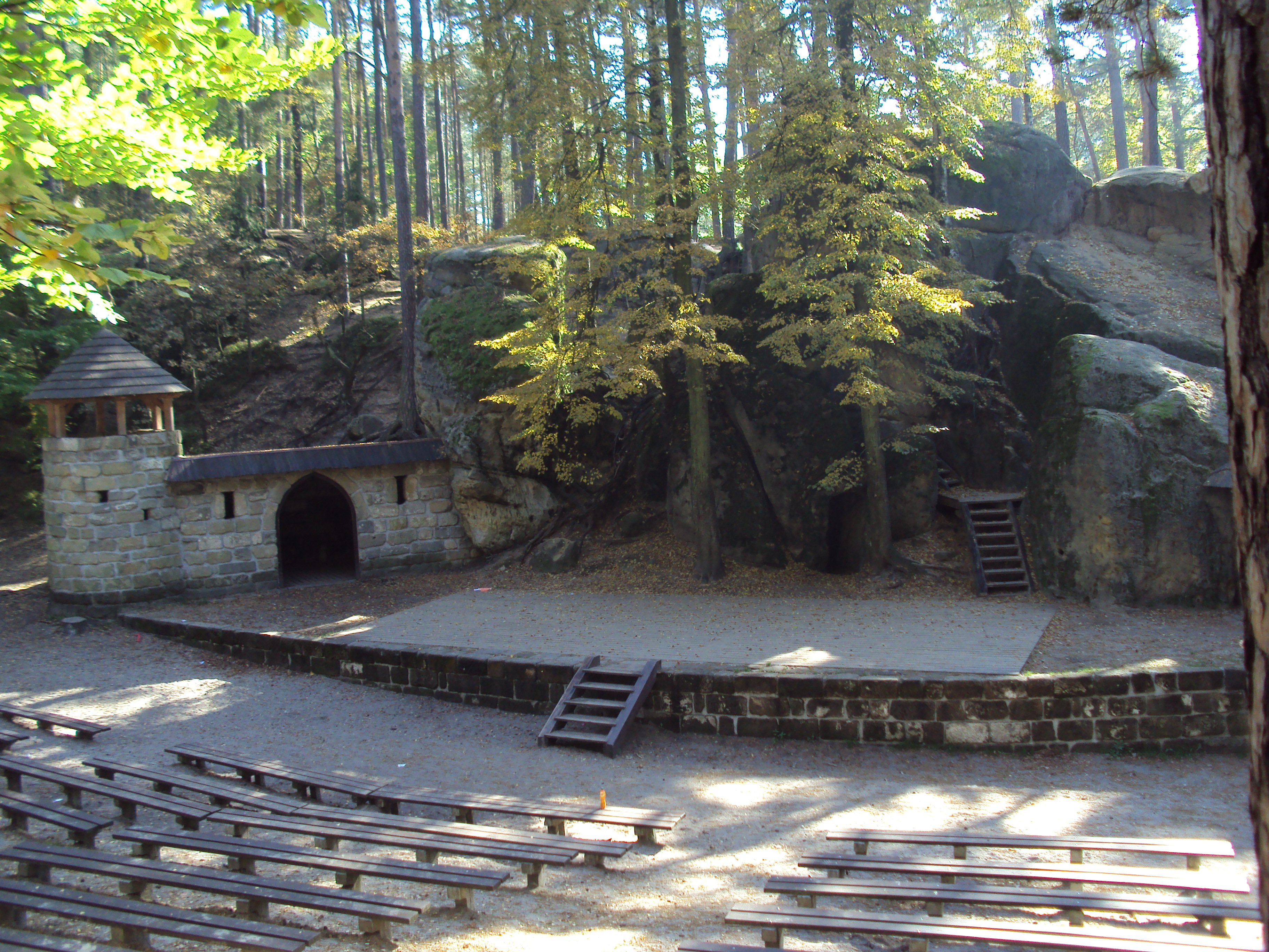 Česky: Lesní skalní divadlo u Sloupu v Čechách, pódium